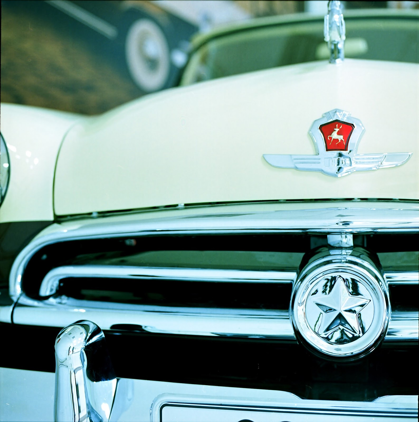 Музей советского автопрома Иваново. Экспозиция